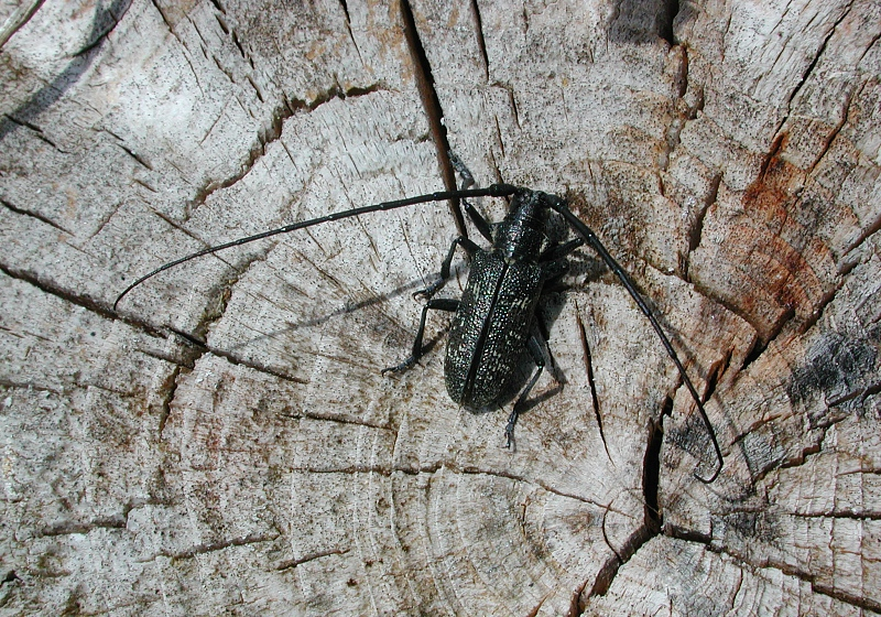 Monochamus sutor (det. Siga), Bockkäfer im Isar-Tal bei Garmisch, Bayern, Deutschland